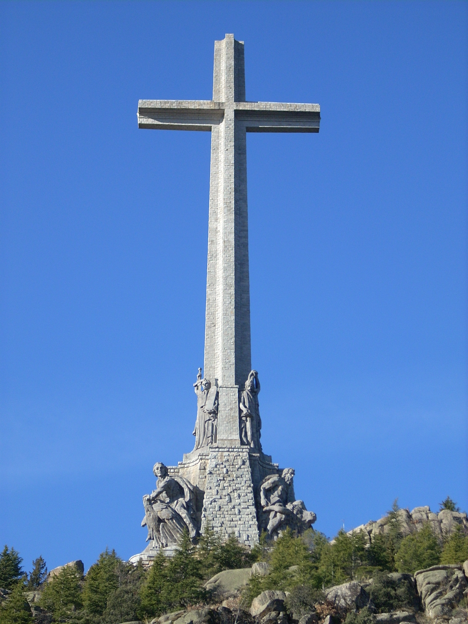 Vista frontal de la Santa Cruz del Valle de los Caídos.